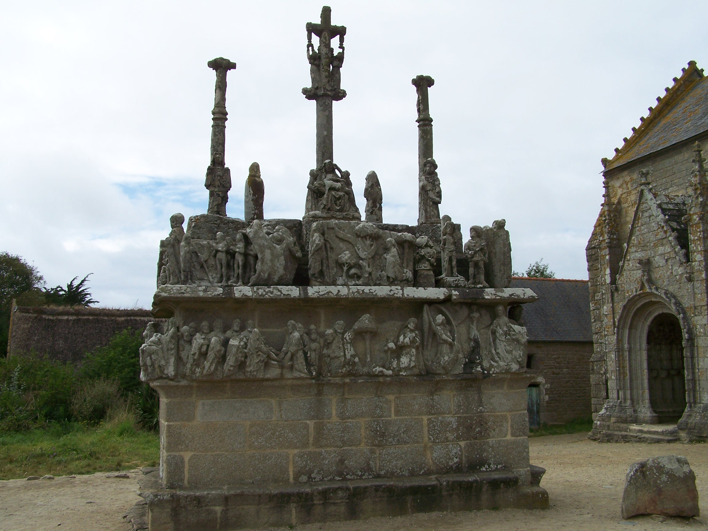 Calvaire de la chapelle N.D. de Tronoën, Finistère, Bretagne, France.